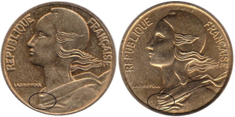 avers de deux pièces de 5 centimes Marianne 3 plis et 4 plis